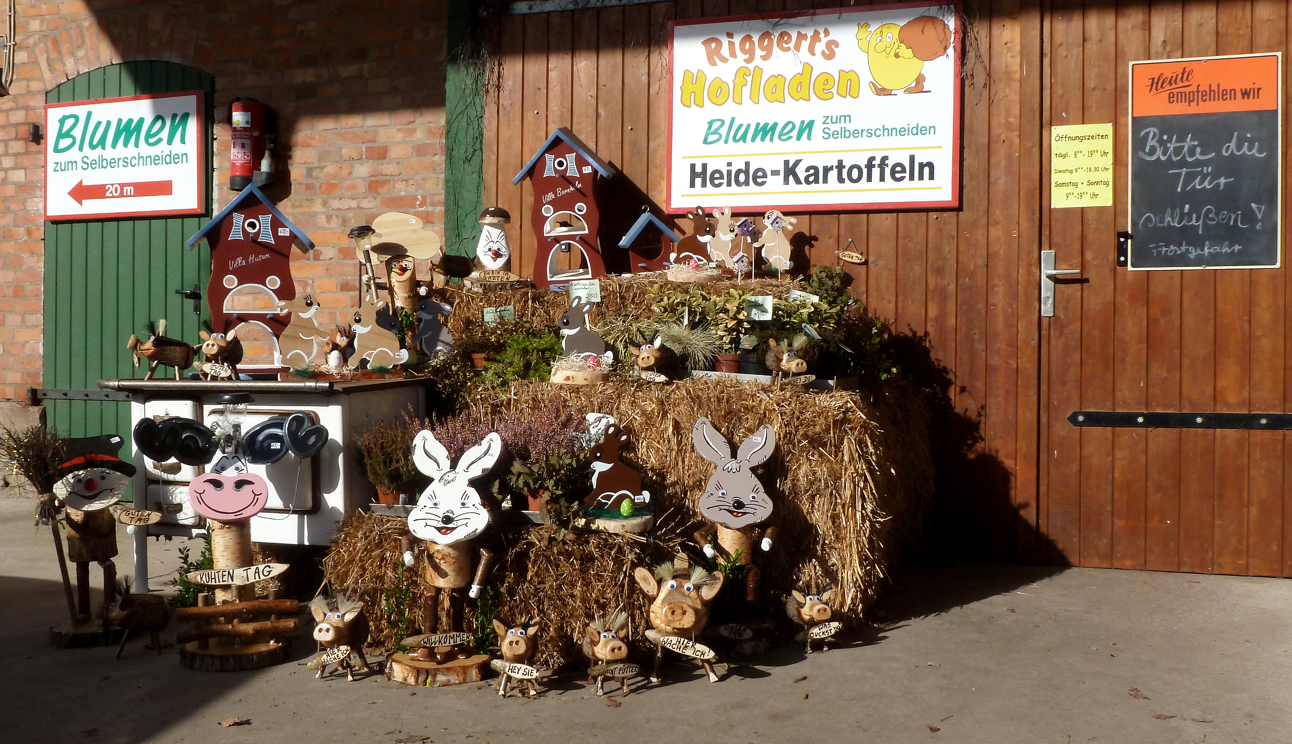 Hofladen von Bauer Riggert in Eimke, Salzwedeler Straße, im Winter.